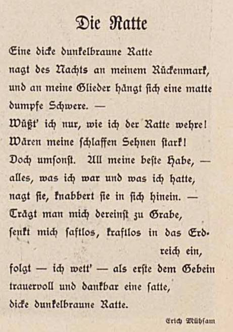 Die Ratte v. Erich Mühsam aus: Simplicissimus Jahrgang 10, Heft 38, 12/1905, S. 448